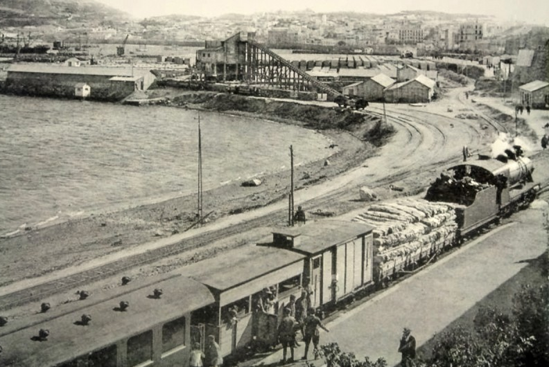 Apeadero del puerto de Ceuta en lo que hoy seria la Playa de Benítez